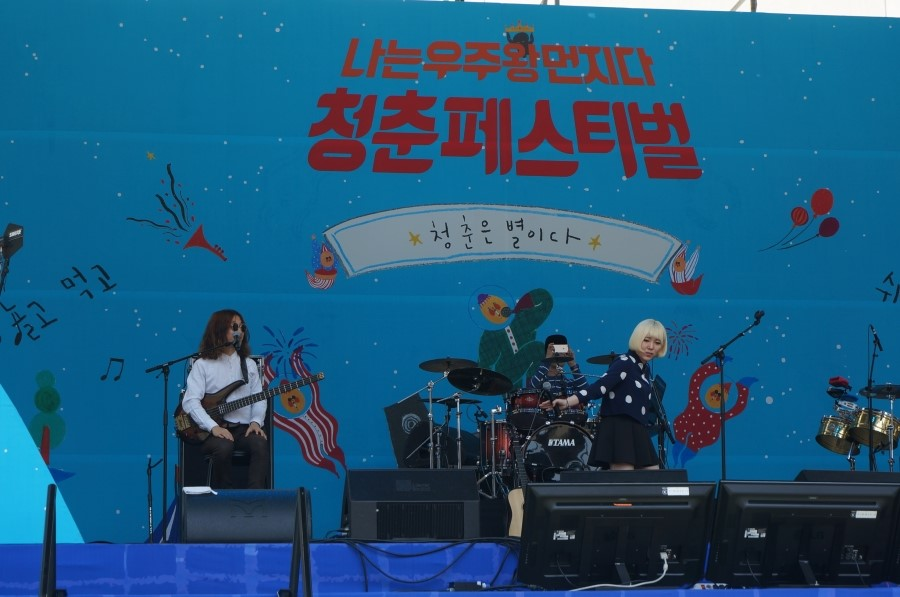 2015년 상암월드컵경기장에서 열린 청춘페스티벌에서 공연중인 신현희와 김루트